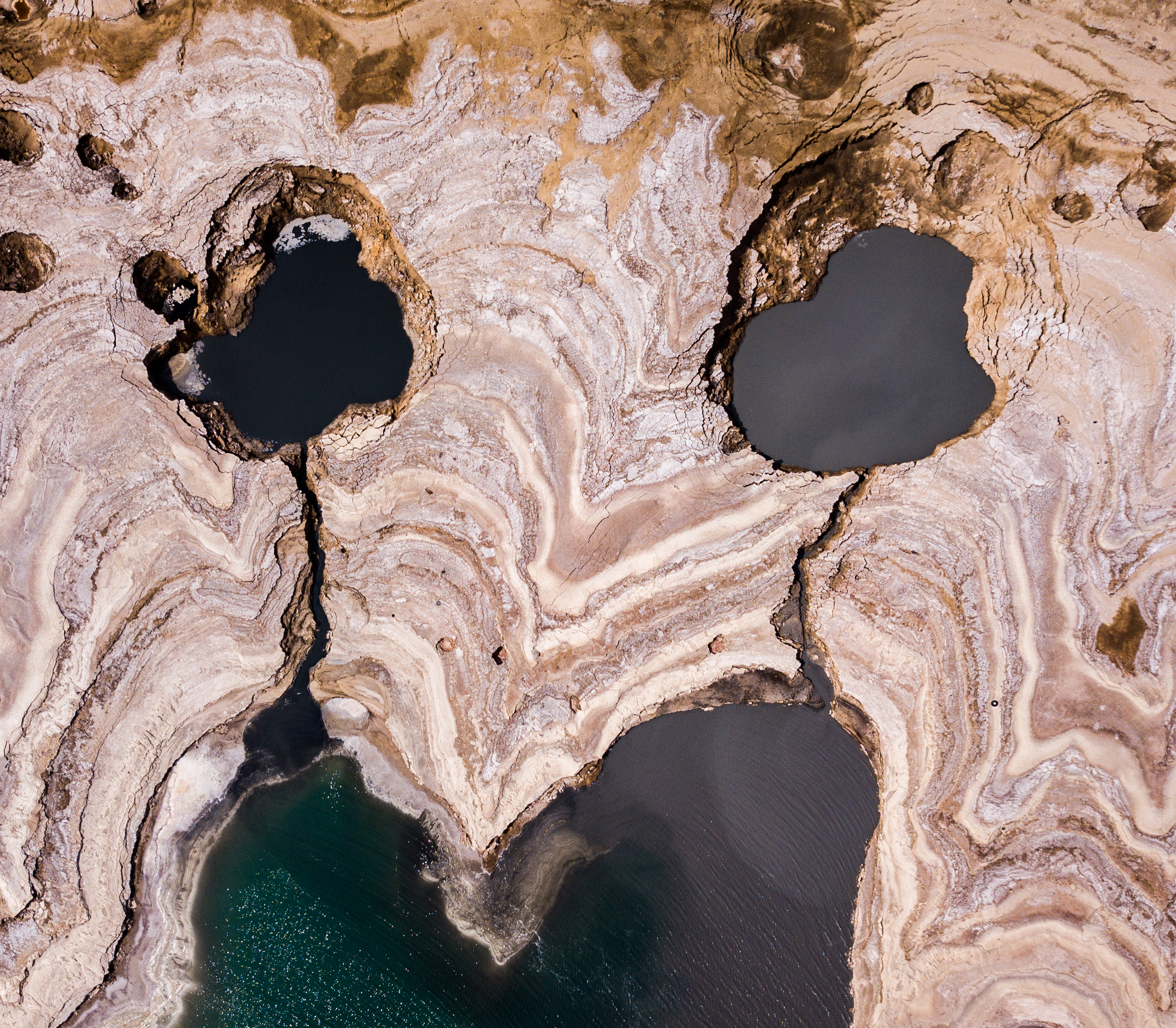 עין גדי הוא שמם של מעיין, שמורת טבע ועיר עתיקה השוכנים לחופו המערבי של ים המלח, בתחומי מדבר יהודה, על כביש 90, כקילומטר אחד צפונית לקיבוץ עין גדי. השמורה משתרעת בשוליו המזרחיים של מדבר יהודה, על שפת ים המלח. השמורה ממוקמת בבקעת ים המלח, שהיא חלק מהשבר הסורי אפריקני.